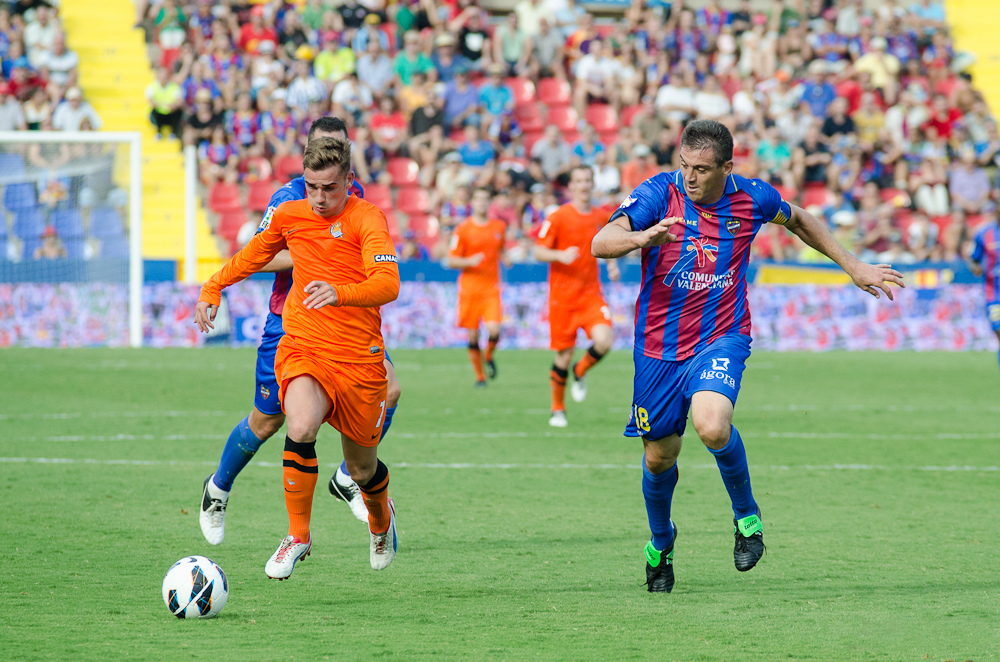 Imatges del partit Llevant-Reial Societat